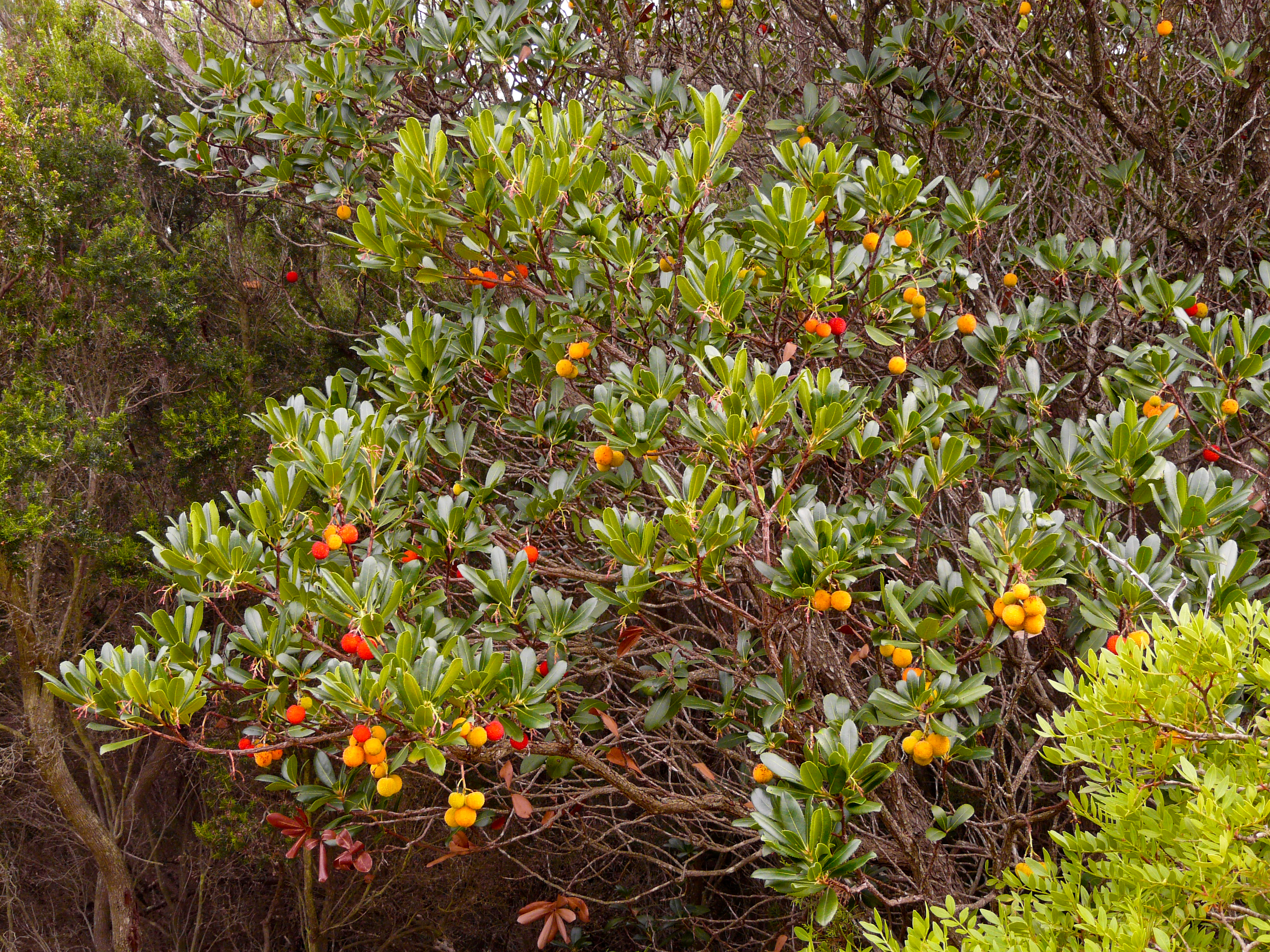 Westlicher Erdbeerbaum am Monte Moro, Gallura, Sardinien